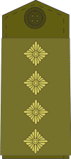 Serbian military ranks and insignia